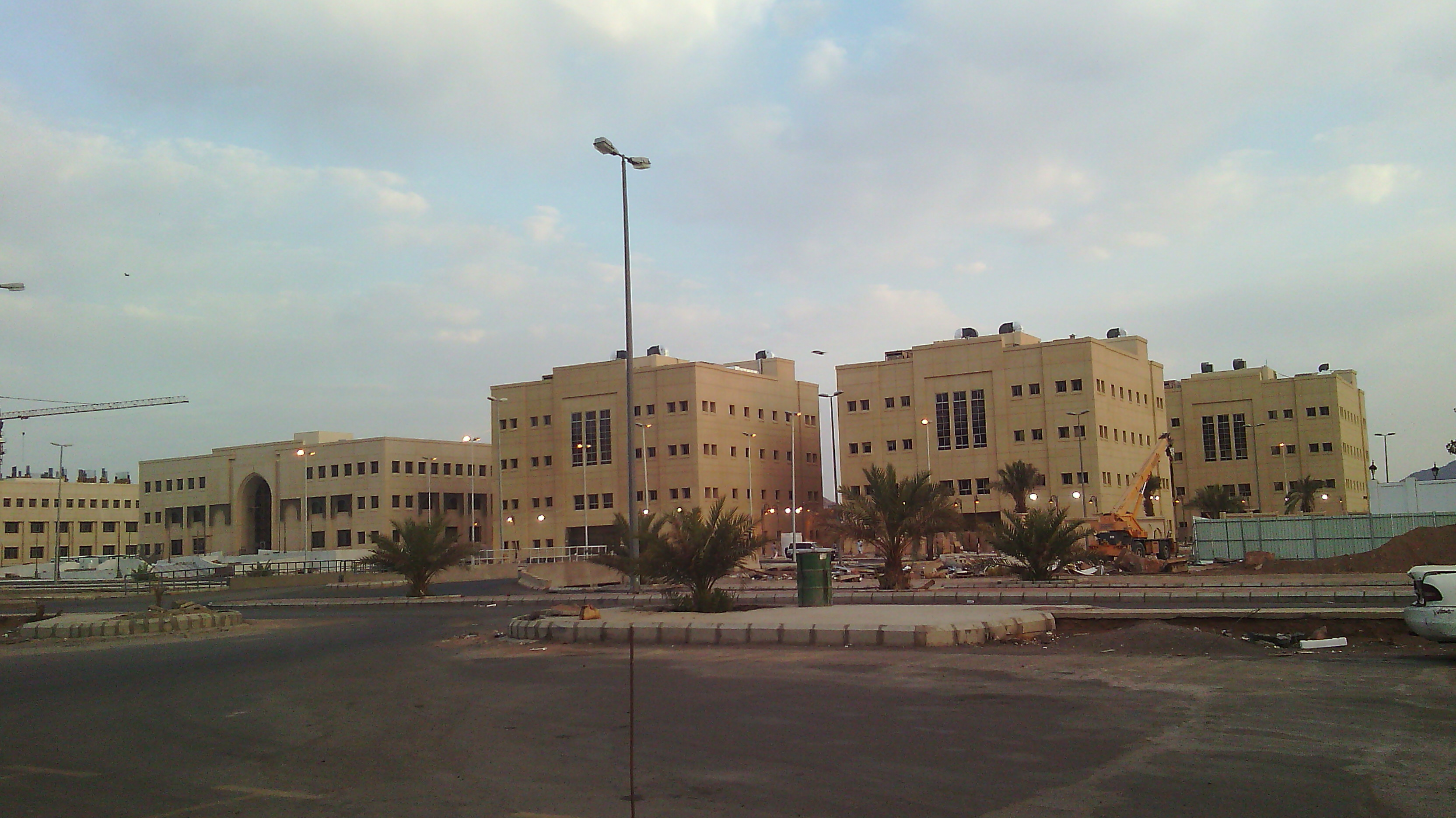 Fakultas-fakultas Umum Universitas Islam Madinah